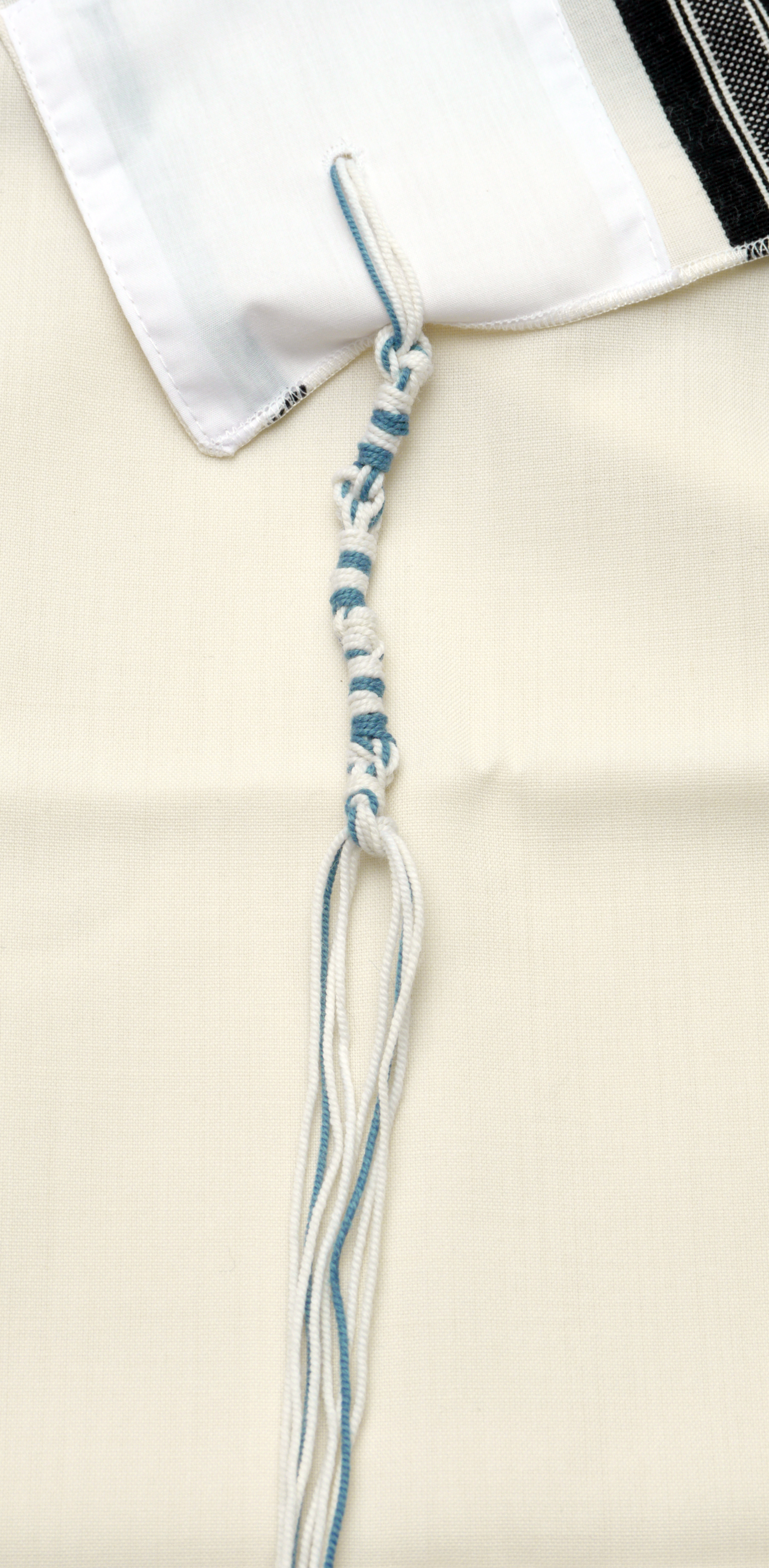 פתיל תכלת קשור לפי שיטת הגר"א